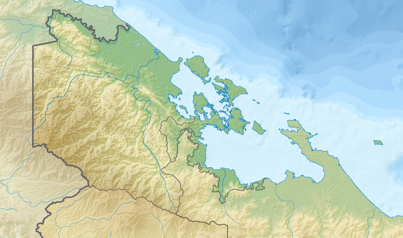 Физическая карта провинции Бокас-дель-Торо, Панама.